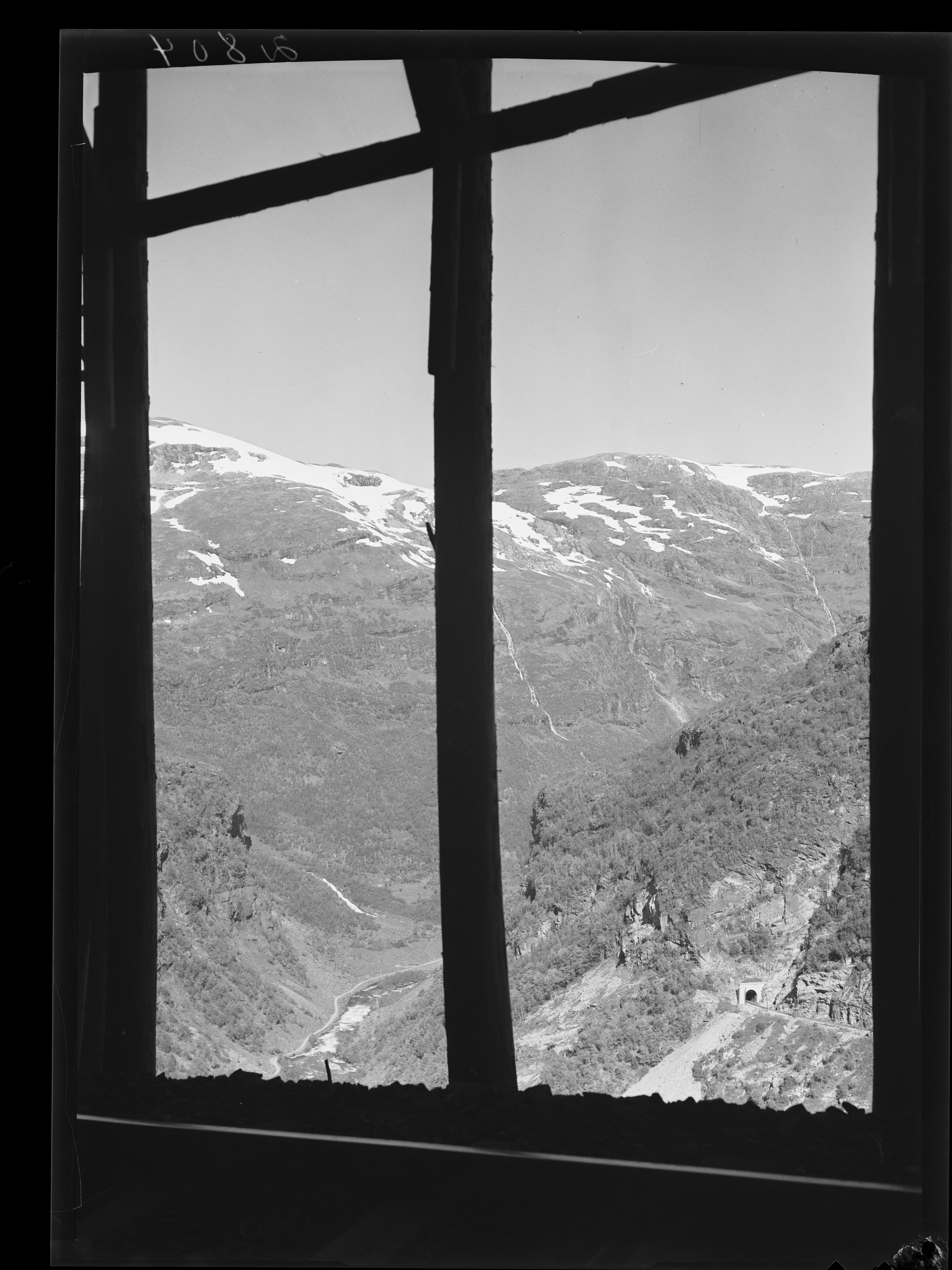 Bildet er hentet fra Nasjonalbibliotekets bildesamling. Anmerkninger til bildet var: Fotograf ukjent. Flåmsdalen, Aurland, Sogn og Fjordane